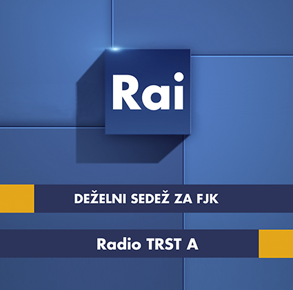 Logotip radijskega programa deželnega sedeža italijanske nacionalne televizije RAI za Furlanijo - Julijsko Krajino, "Radio Trst A".